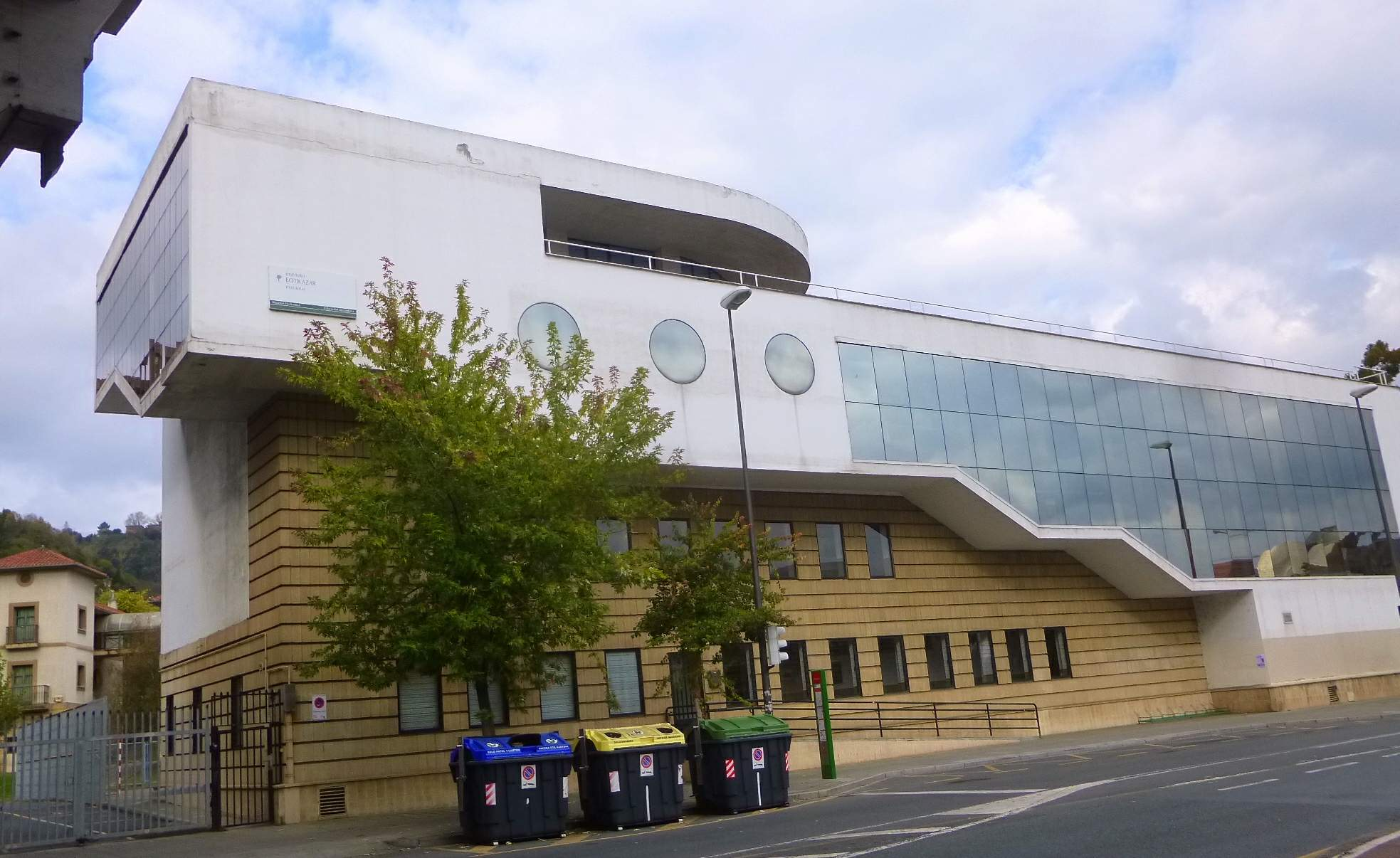 Bilbao - Instituto de Educación Secundaria (IES) Botikazar. El edificio, construido en 1984, acogió anteriormente la Escuela de Navegación y el Instituto de Ciencias de la Educación (ICE)